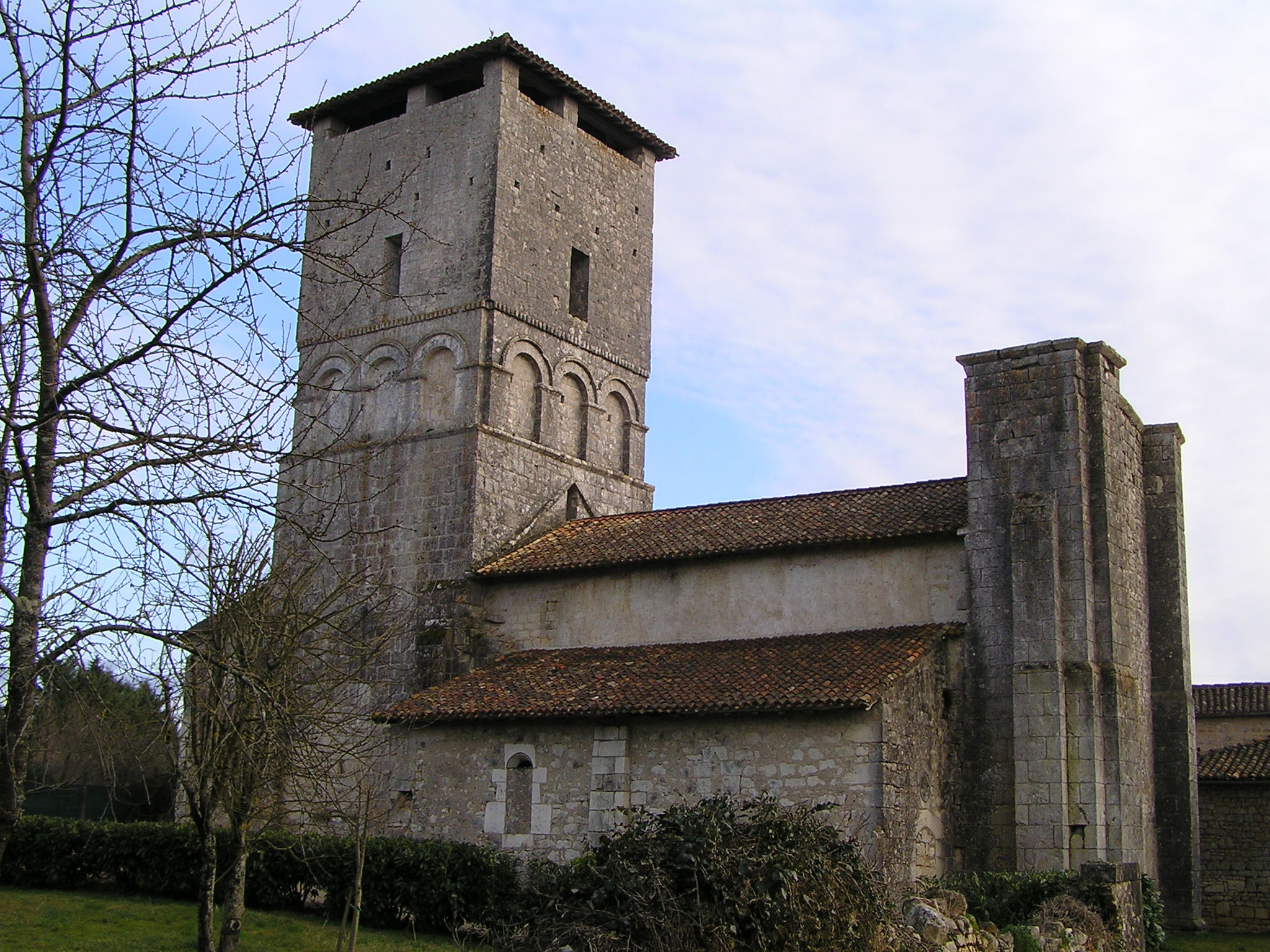 l'église de Saint-Paul commune de Chazelles, Charente, France